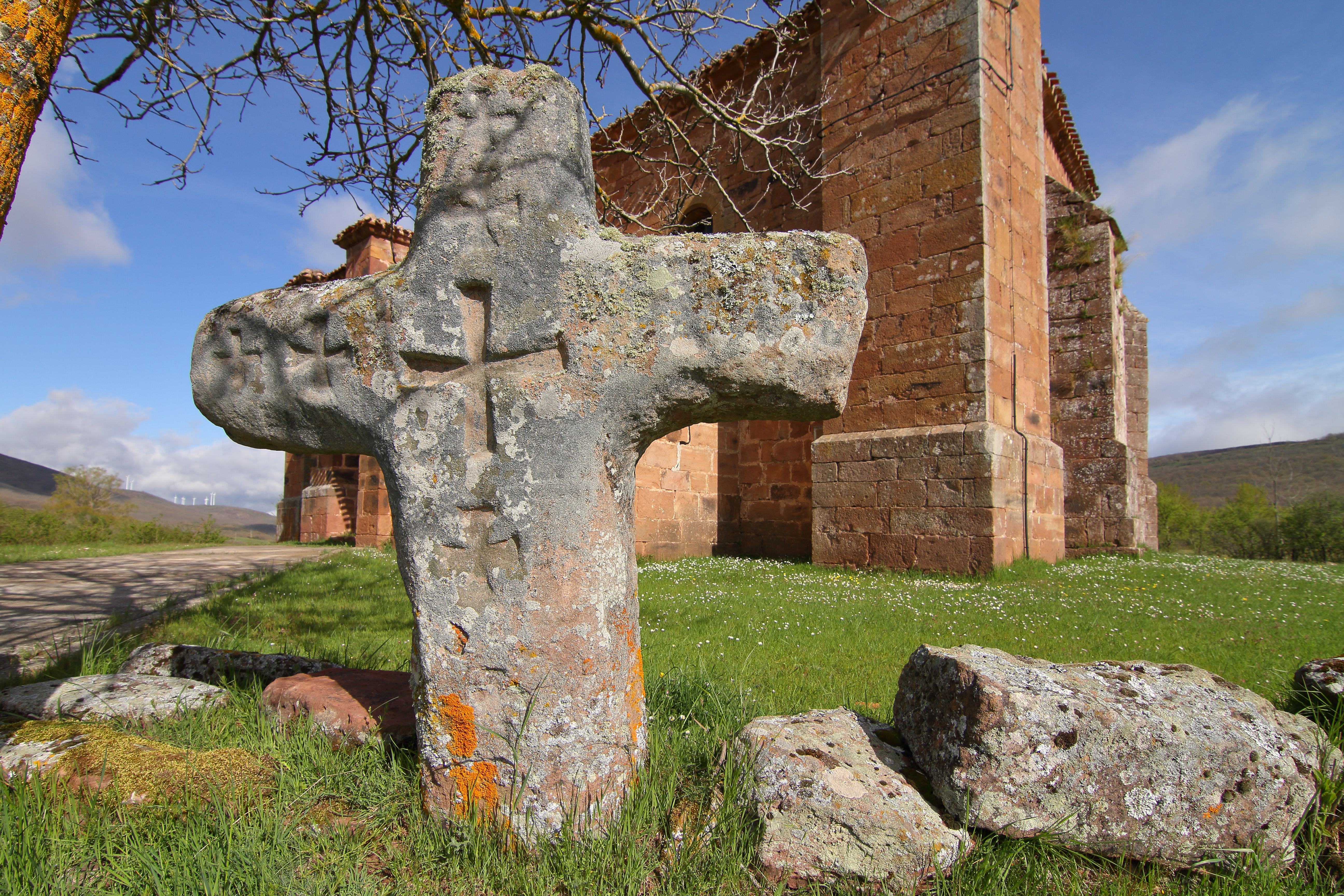 Villamiel de la Sierra, Iglesia de San Pedro Ápostol, cruz medieval